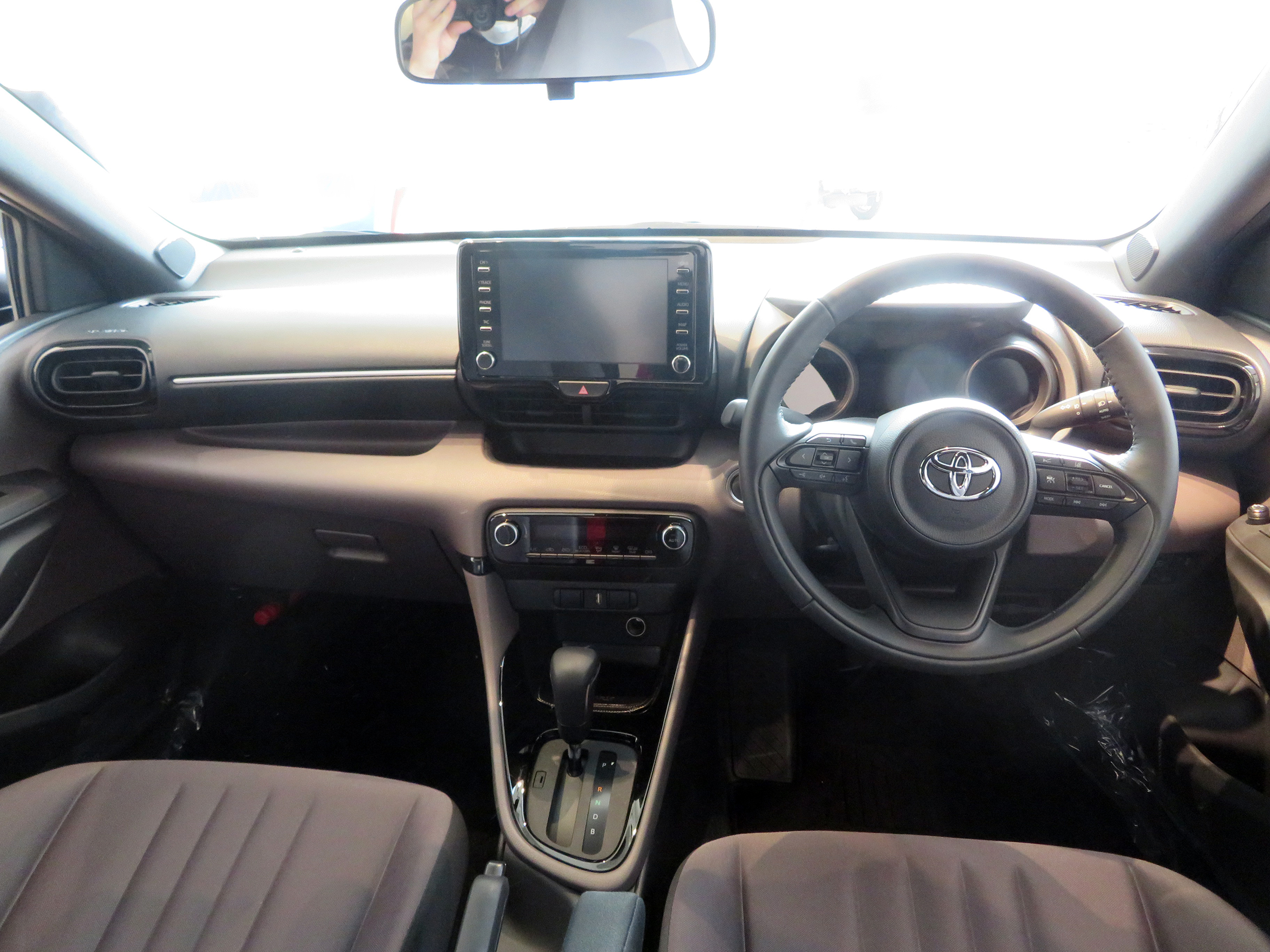 GR PARTS装着の5BA-MXPA10-AHFGB型トヨタ・ヤリスG 4WDのインテリアを撮影。